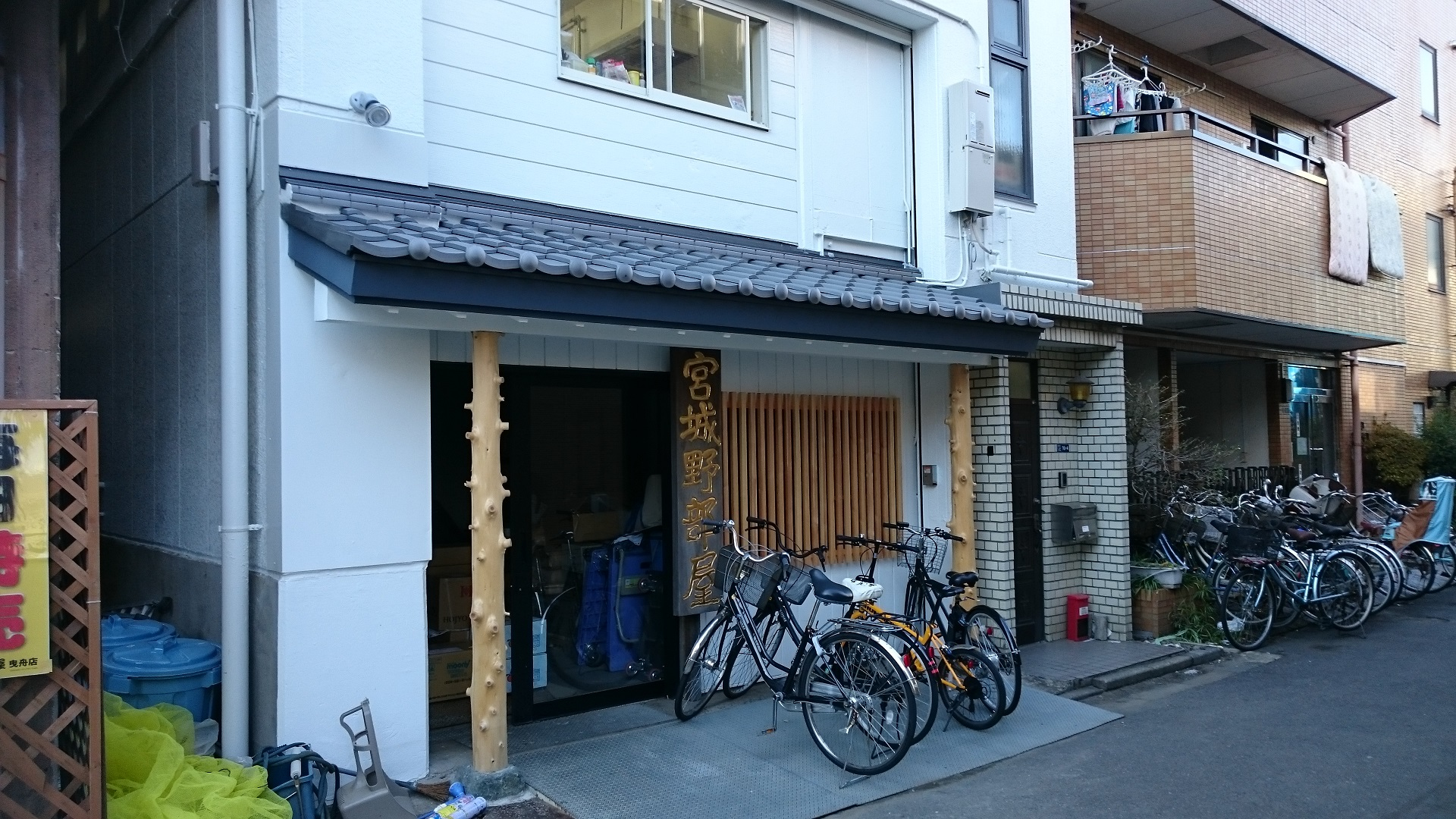 大相撲 宮城野部屋の正面玄関